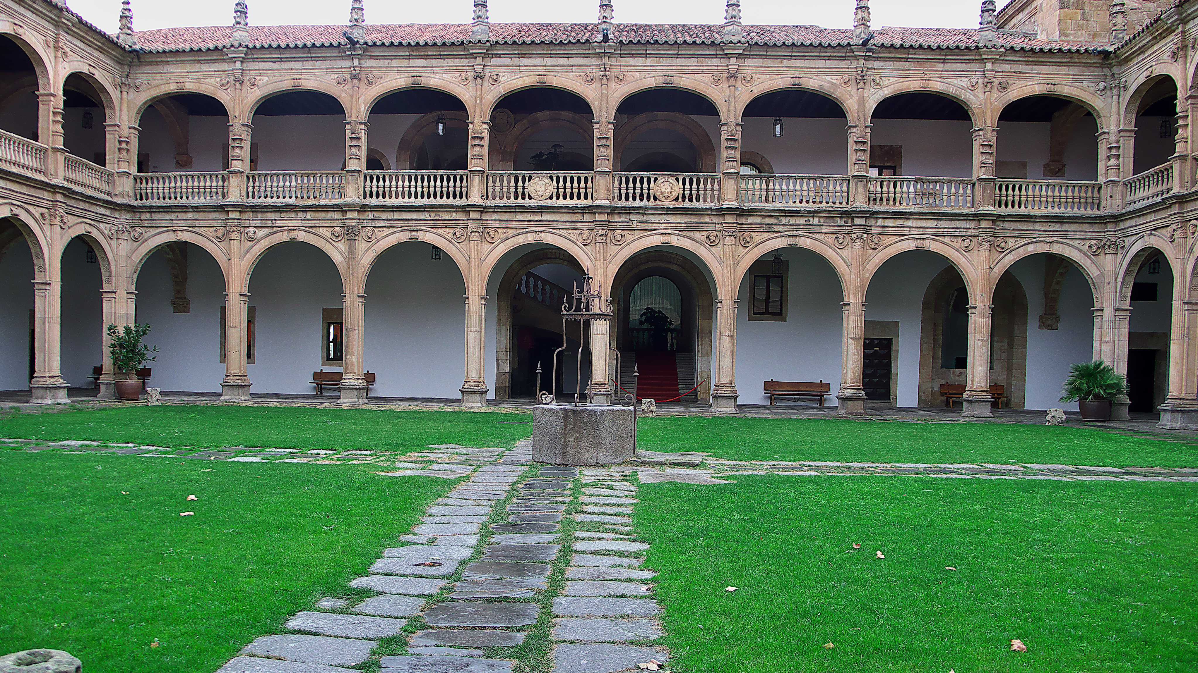 Un proyecto de estas dimensiones requería la intervención de los principales especialistas como Pedro de Ibarra, Alonso de Covarrubias, Rodrigo Gil de Hontañón, Juan Martín, Luis de Vega, etc..